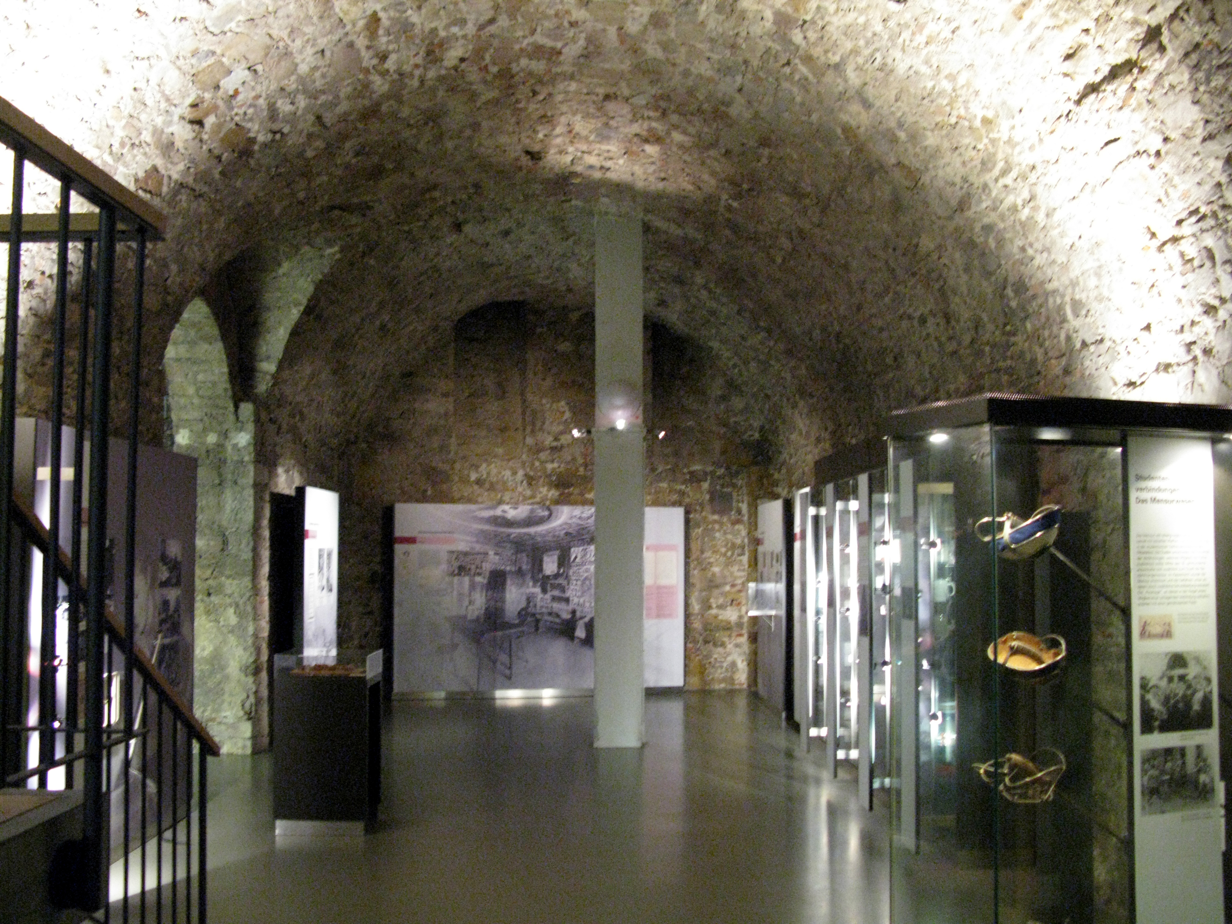 Tiefkeller der Alten Universität in Freiburg